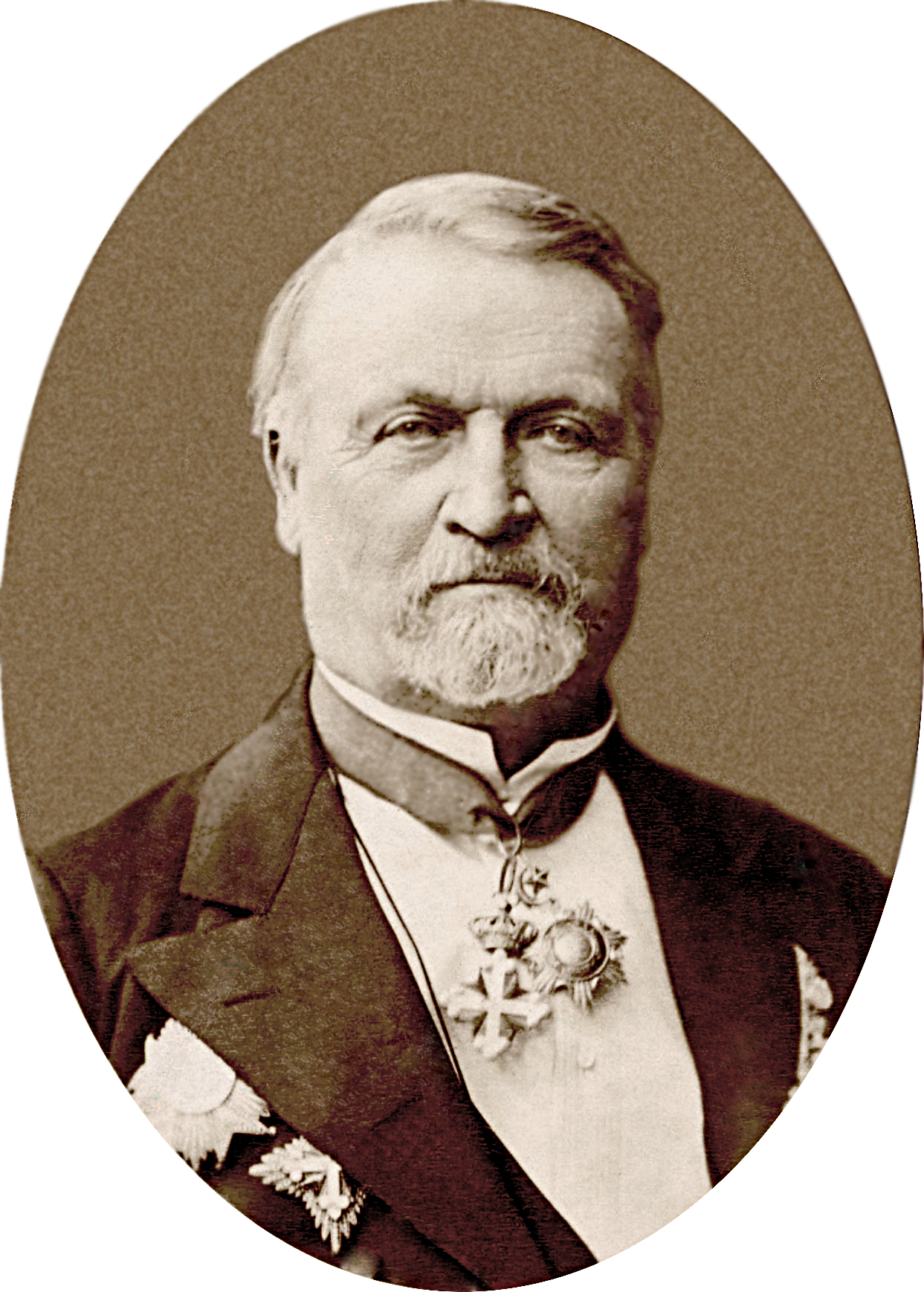 Emmanuel Félix de Wimpffen (1811 - 1884), général français